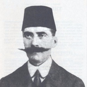 الكاتب خليل خالد